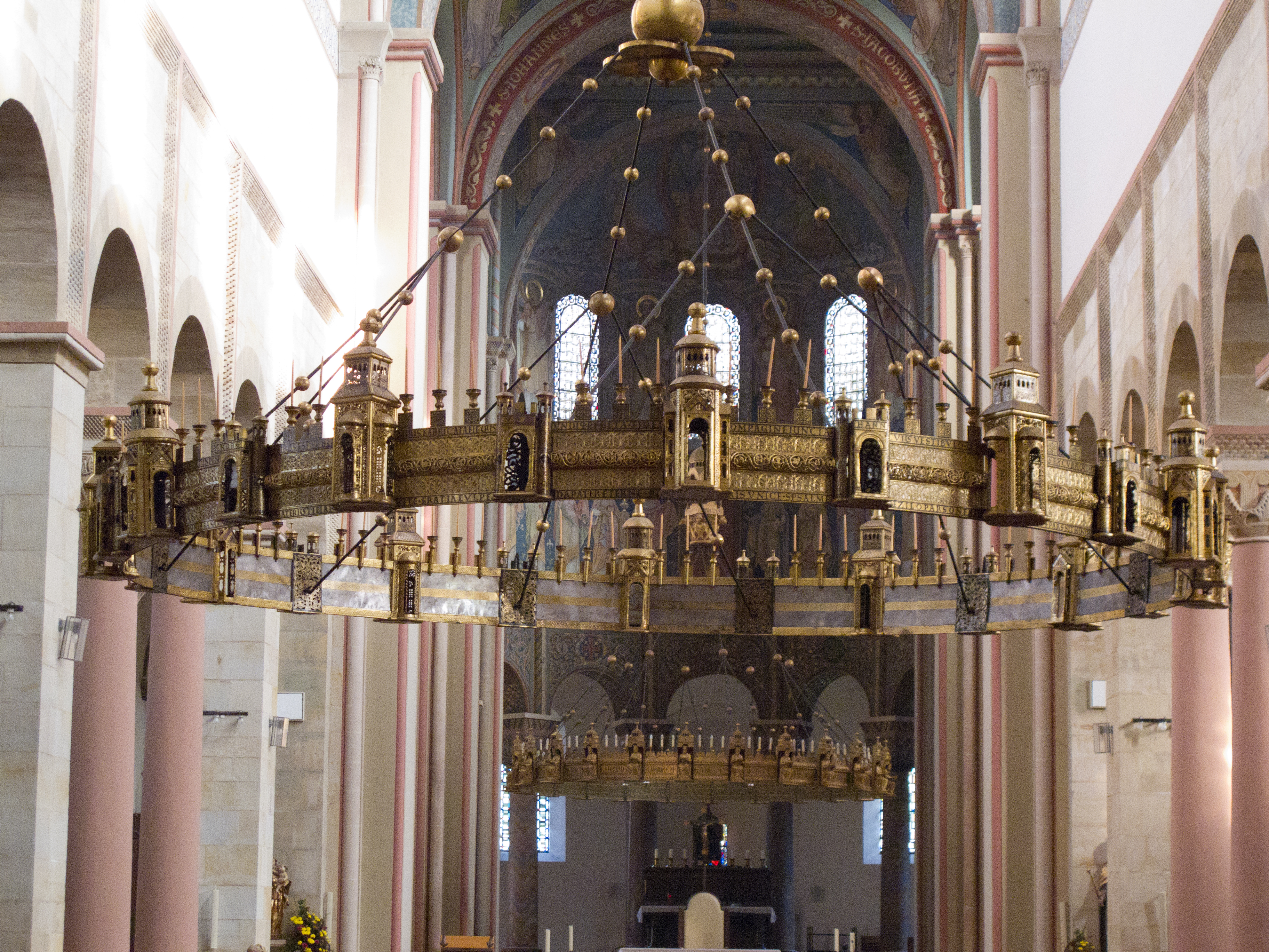 Heziloleuchter (im Vordergrund) im Mittelschiff von St. Godehard (Hildesheim) während der Sanierung des Hildesheimer Doms